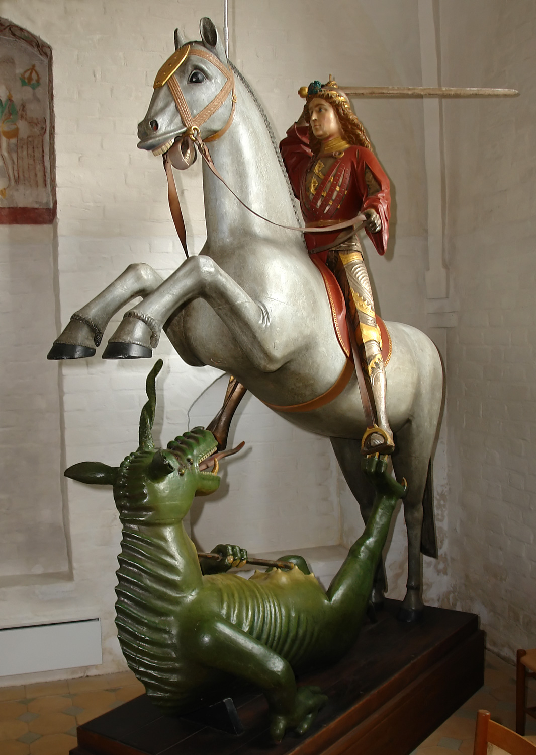 Broager Kirke: St.Georg mit dem Drachen (um 1490), der Drachen wurde 1880 erneuert.